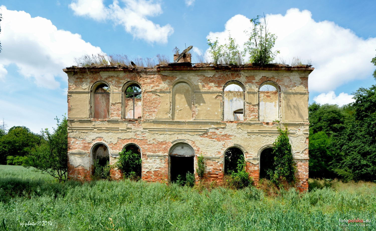 Budynek